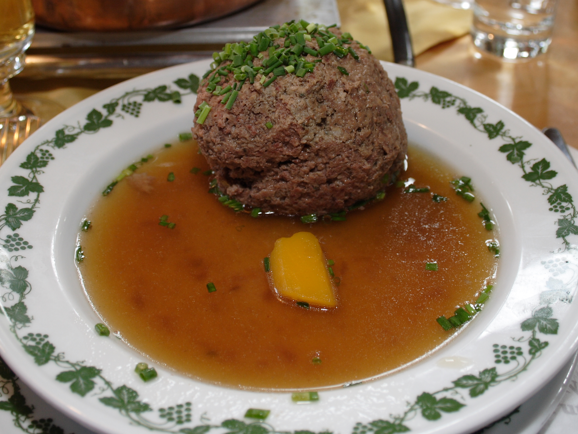 Leberknödel als Suppenbeilage